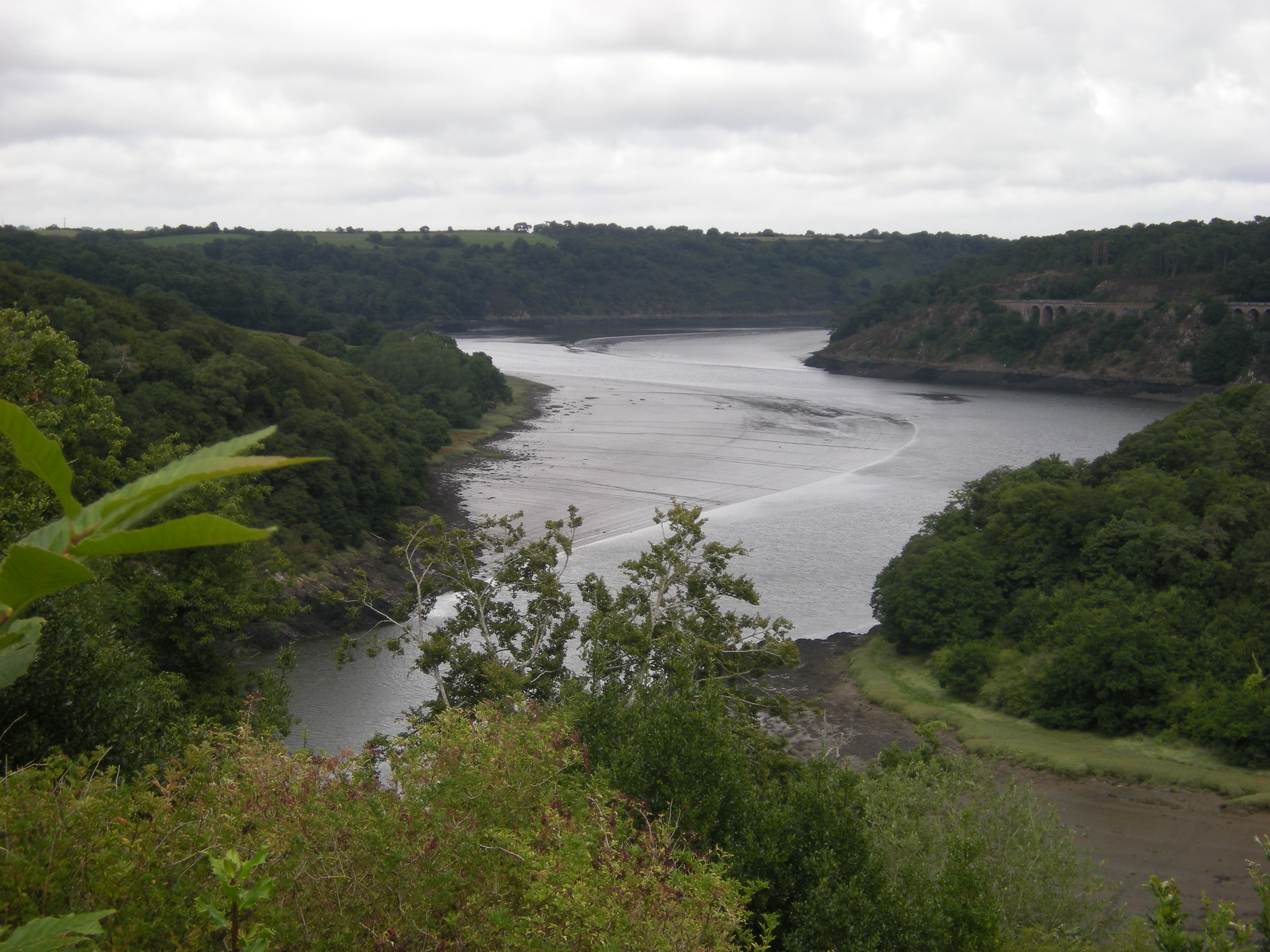 Château de la Roche-Jagu. Vues générales du château, des jardins et du Trieux. La rivière du Trieux en aval du château de la Roche-Jagu. Sur la rive droite, la ligne de chemin de fer Guingamp-Paimpol.